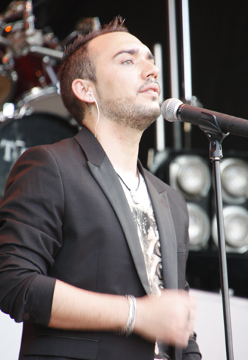 Iván Gardesa en Concierto